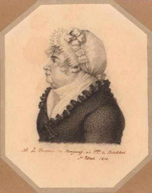 Баронесса Наталья Михайловна Строганова, ур. Белосельская-Белозельская (1745—1819)